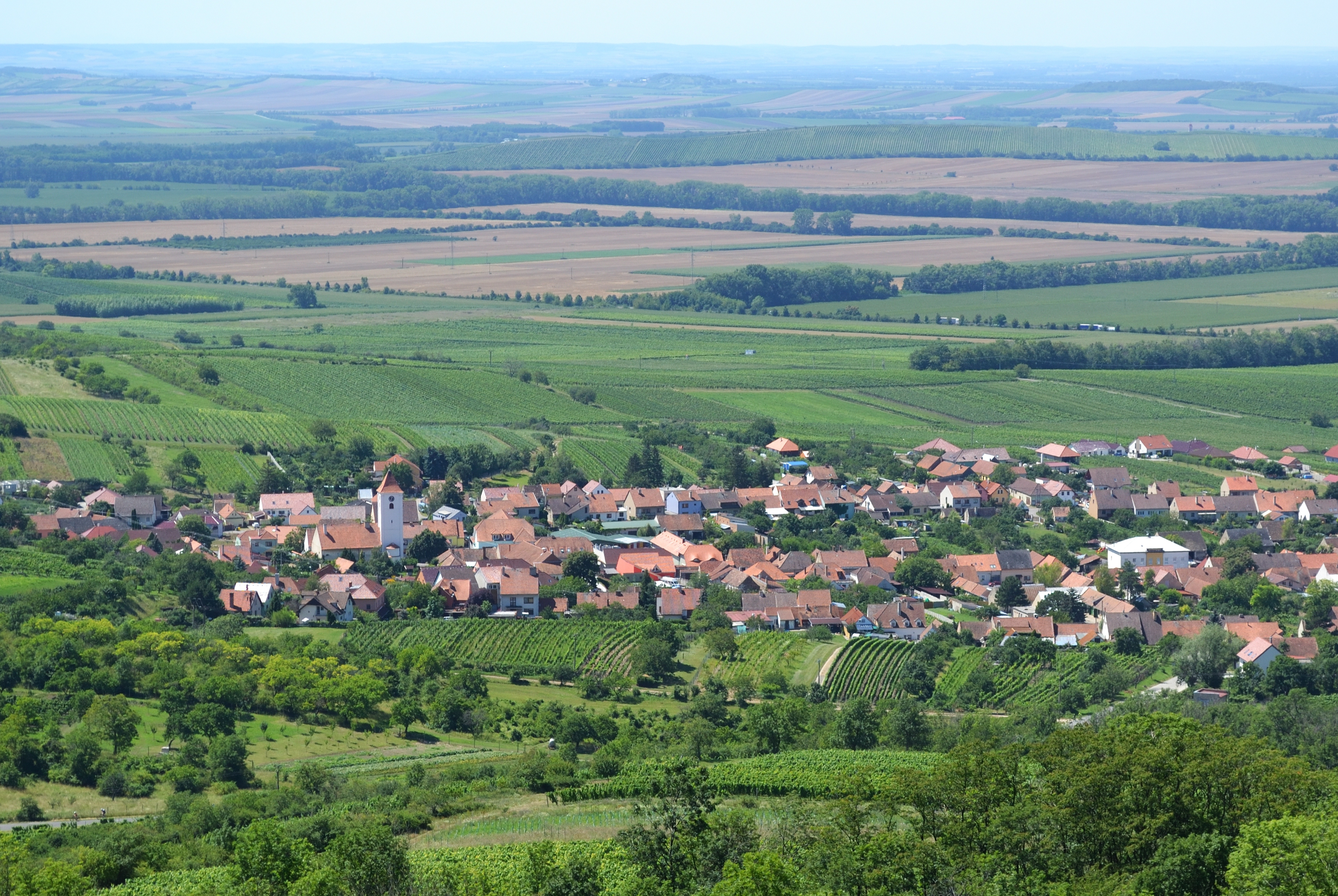 Perná - pohled od severovýchodu.